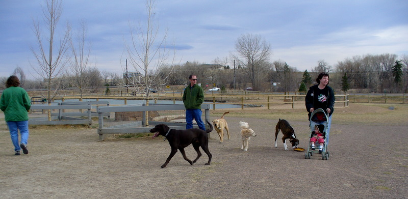 dogs playing at dog park